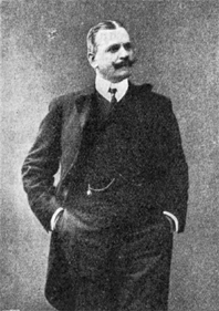 Albin Lavén, 1861-1917